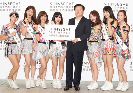 꼭 남기고픈 그 순간! -신세계면세점에 -아이돌이 떴다!